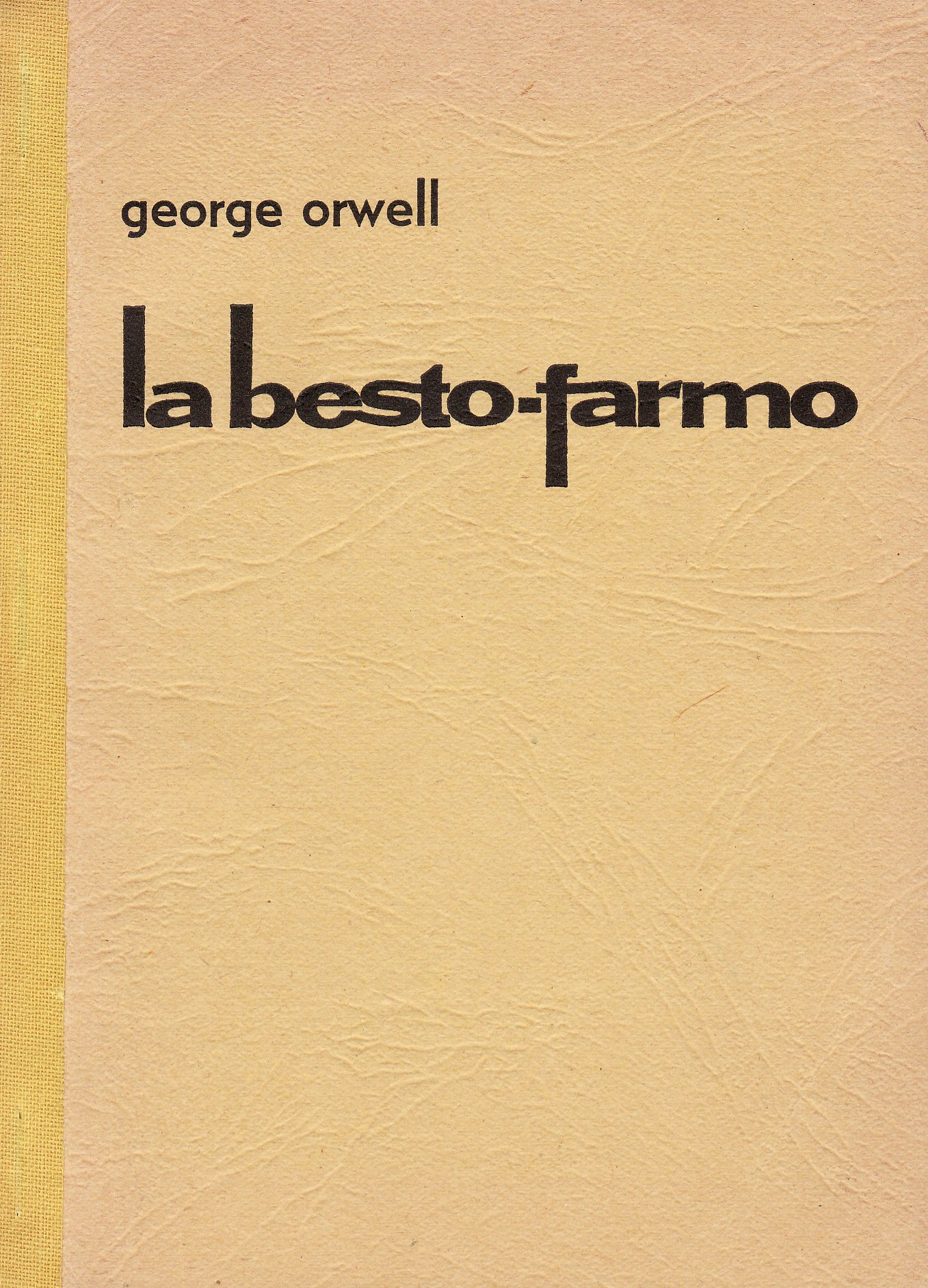 La Besto-farmo